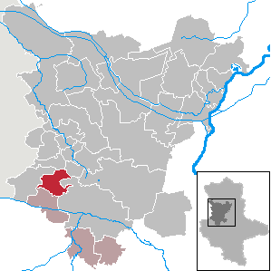 Ausleben in Saxony-Anhalt (Country) - District (Landkreis) Börde